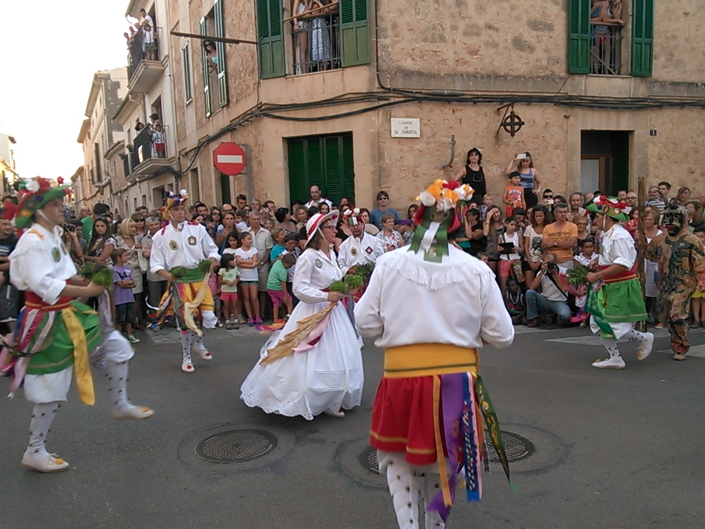 Ball dels cossiers d'Algaida